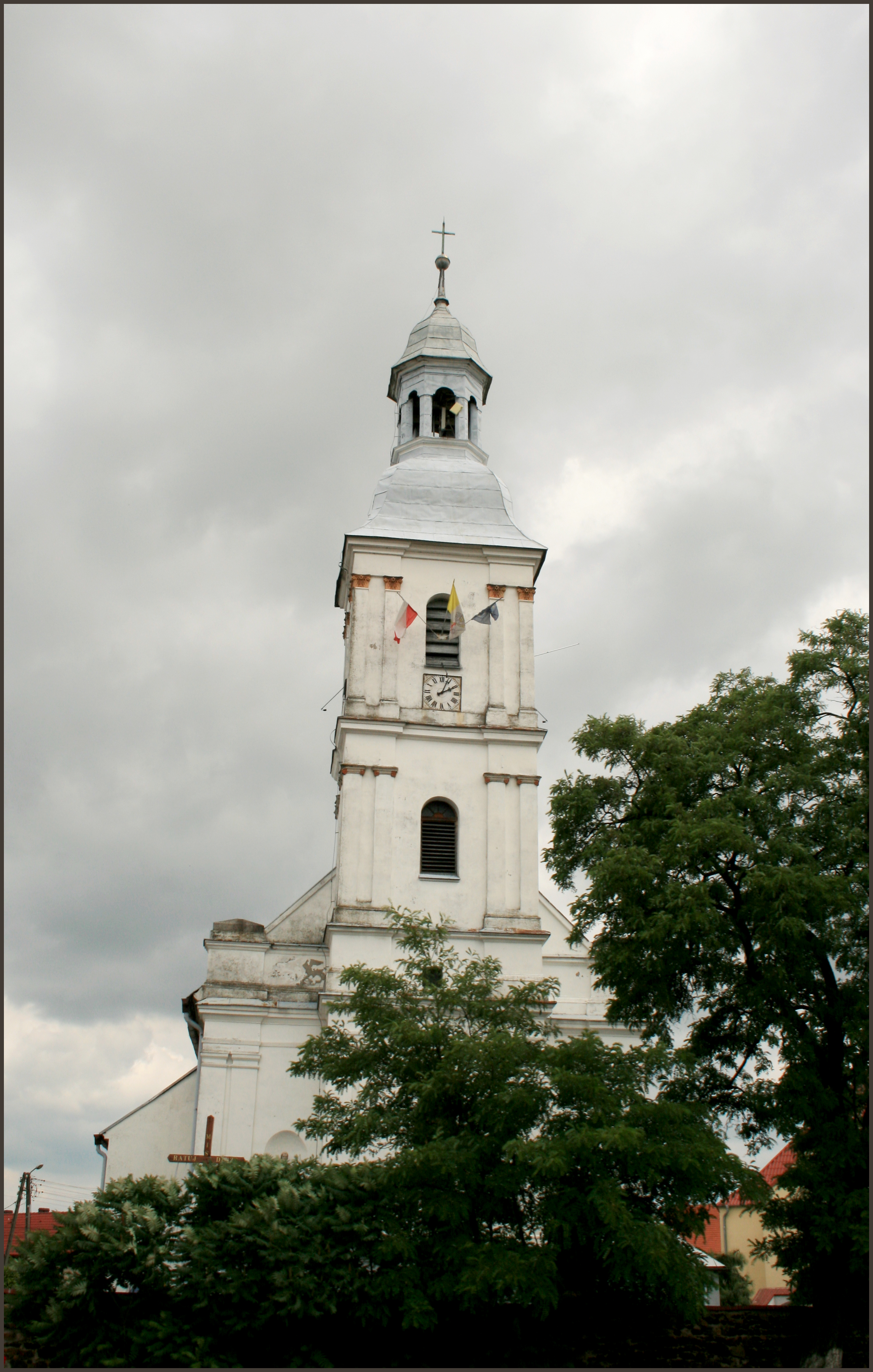 Sidzina